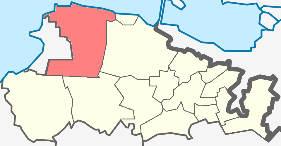 Лебяженское городское поселение Ломоносовского района Ленинградской области.